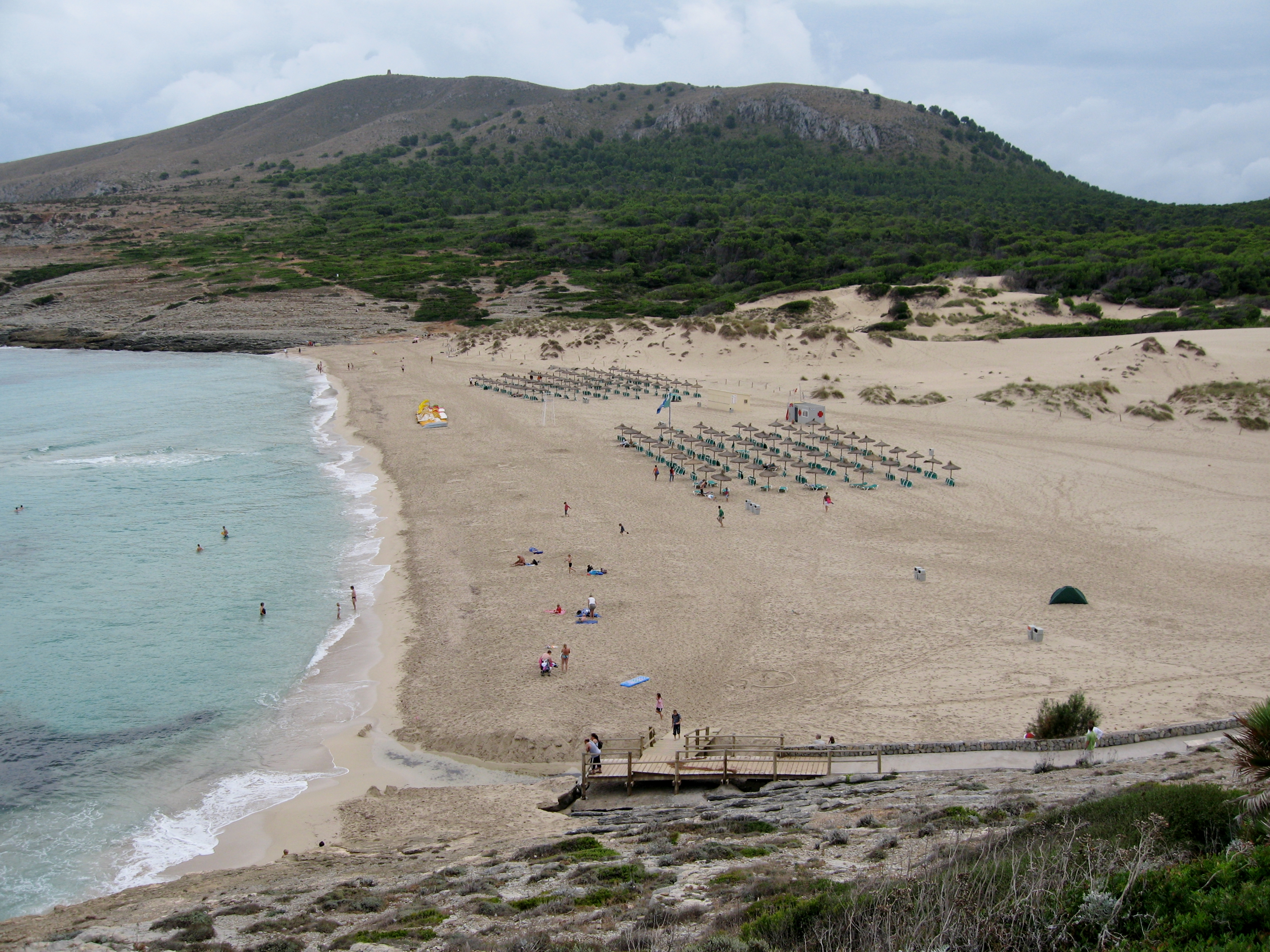 Cala Mesquida, Capdepera, Mallorca, Spain